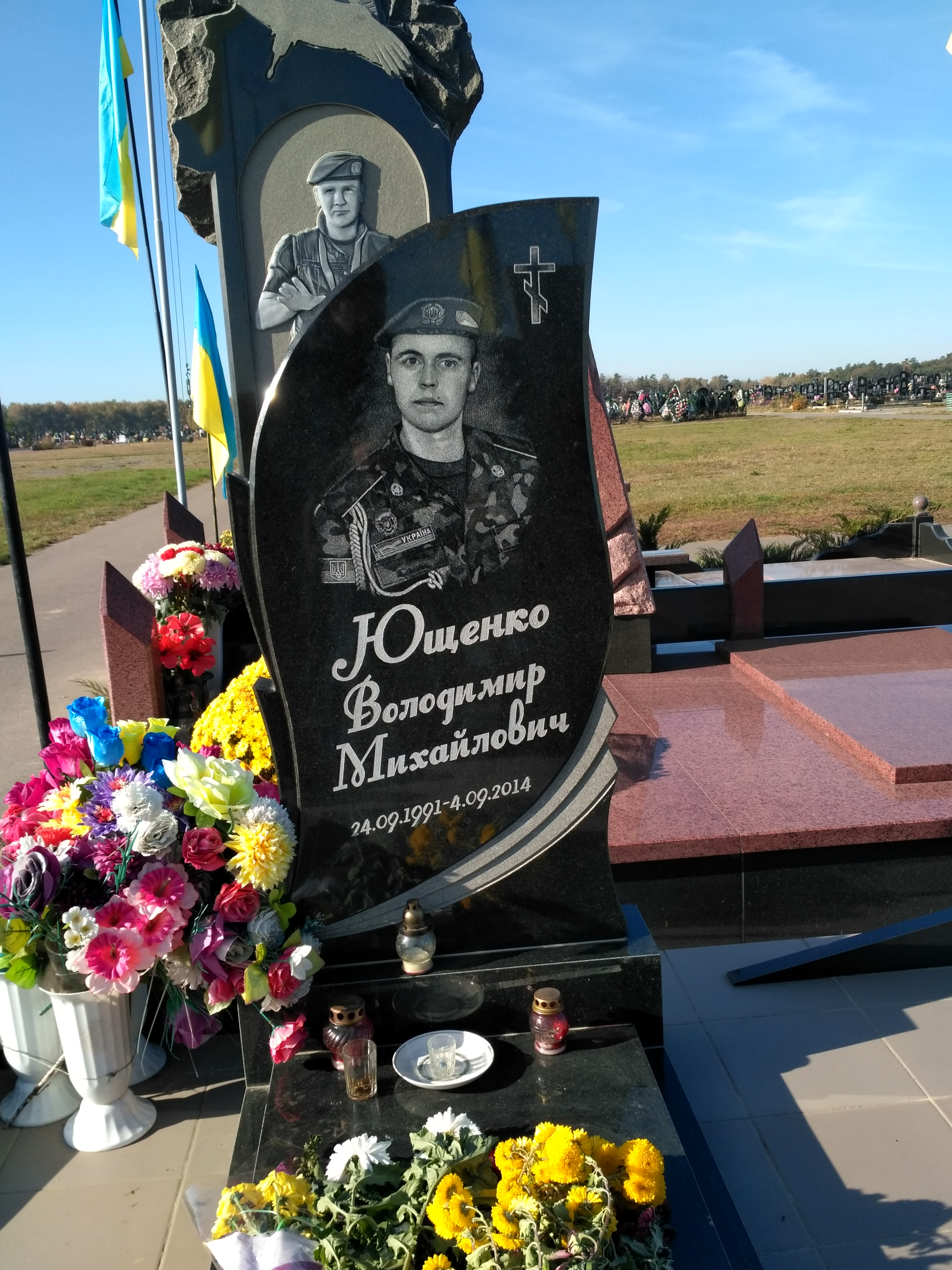 могила